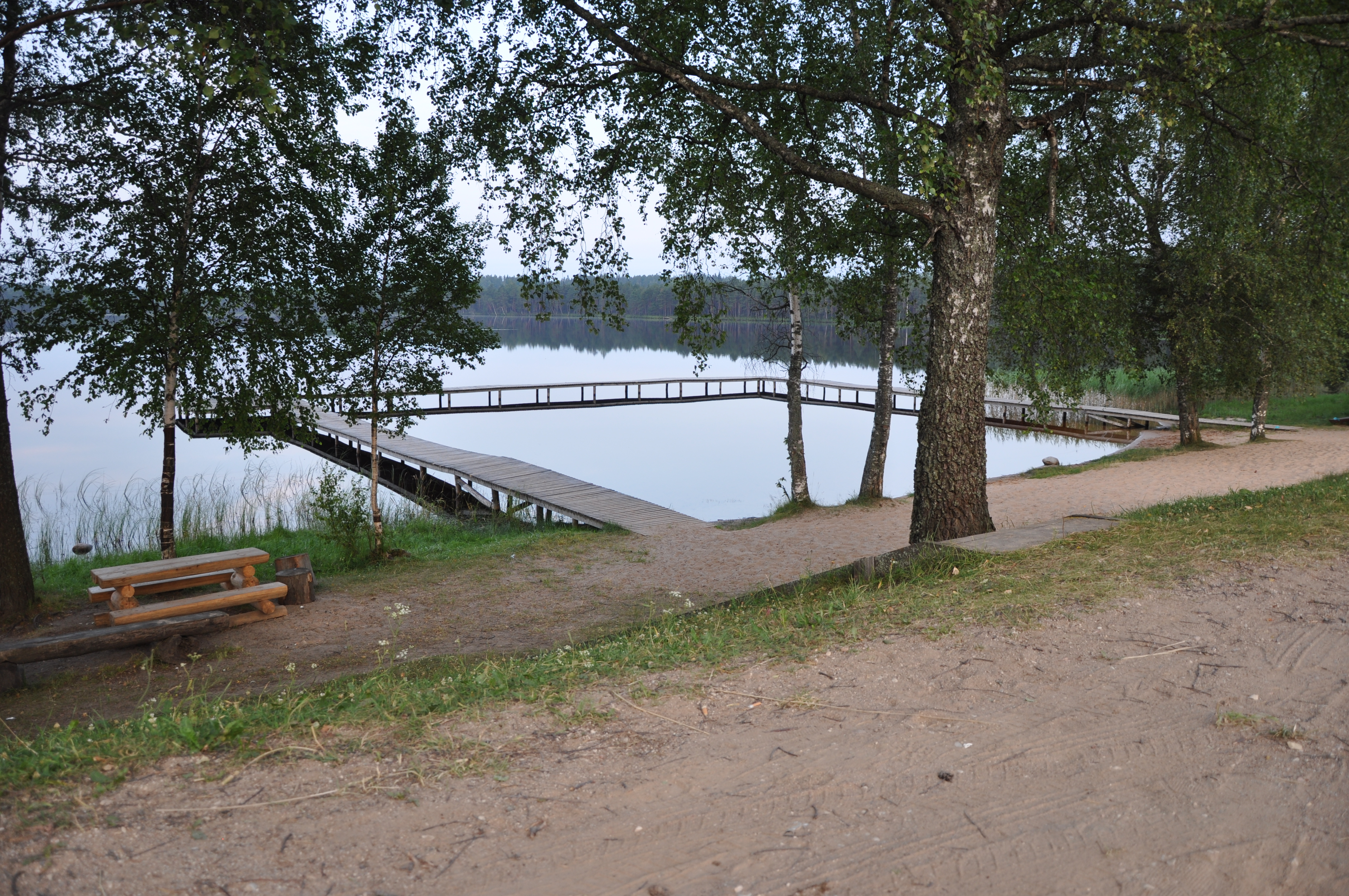 Kirikumäe lake, Estonia